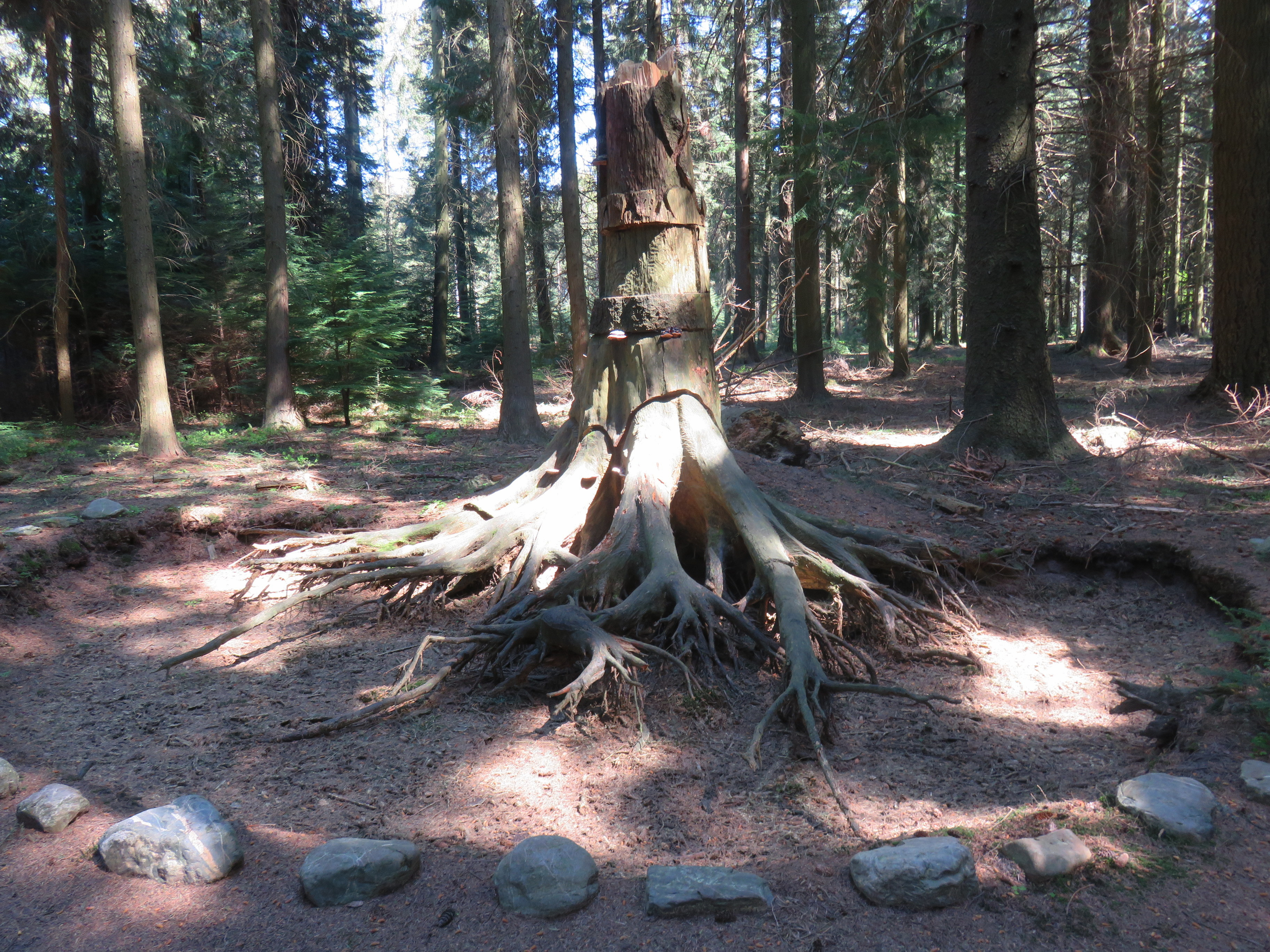 'Ich suche meine Wurzeln', Benoit Pelzer. Kunst in Ar(t)boretum Mefferscheid (be)